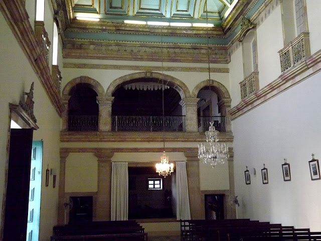 Coro do Convento de Santa Clara do Desterro. As relíquias da Madre Vitória encontram-se no coro inferior.